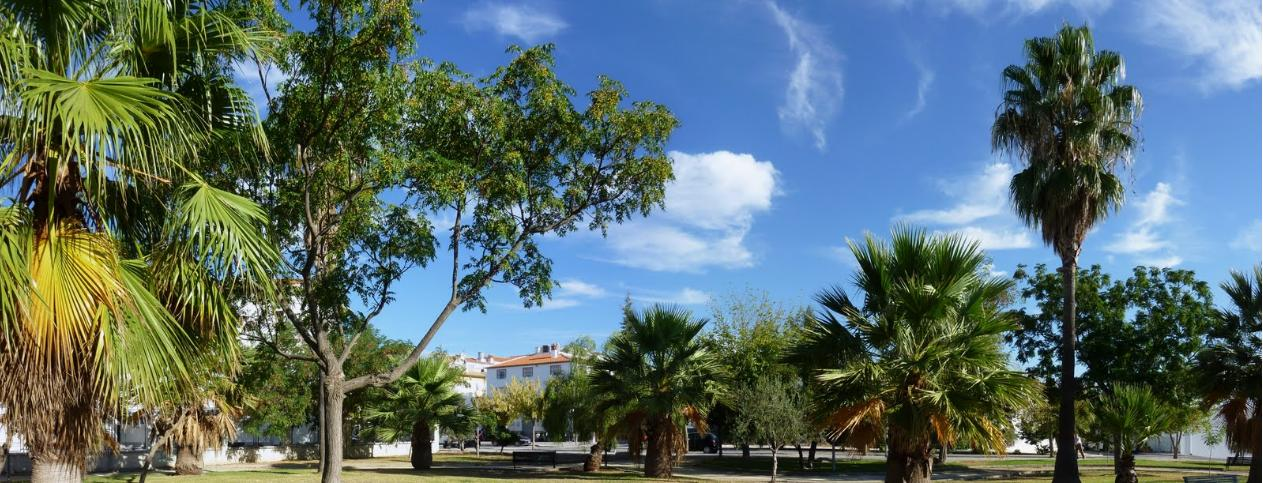 Parque Rodriguez de la Fuente, Olvera